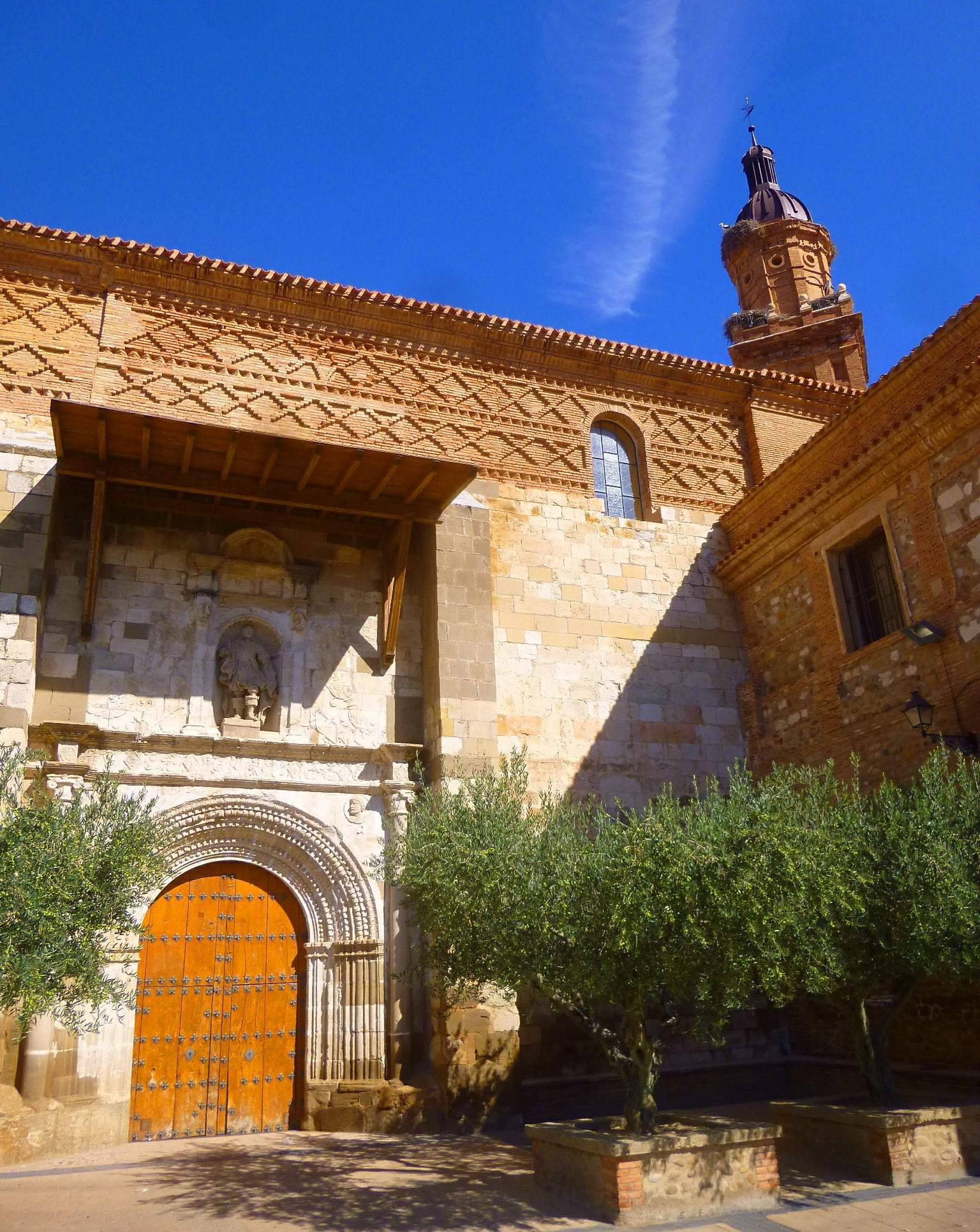 Iglesia de San Adrián y Santa Natalia (Autol, La Rioja)